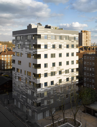 Stadthaus; Murray Grove Vertical Elevation